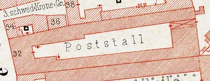 Ausschnitt aus dem Ravensteinstadtpaln für Frankfurt am Main (Große Friedberger Straße 32)